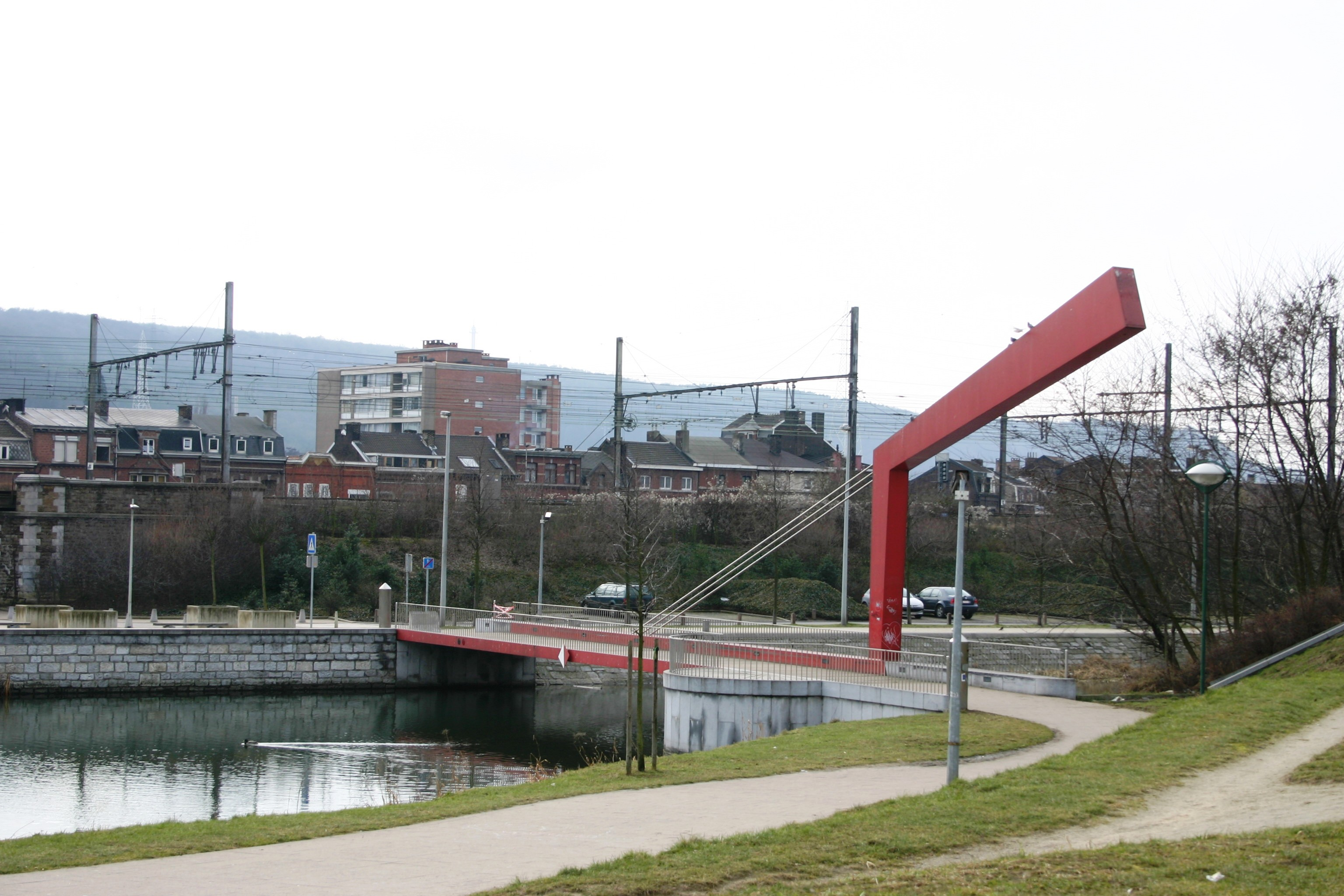 Passerelle des Aguesses.